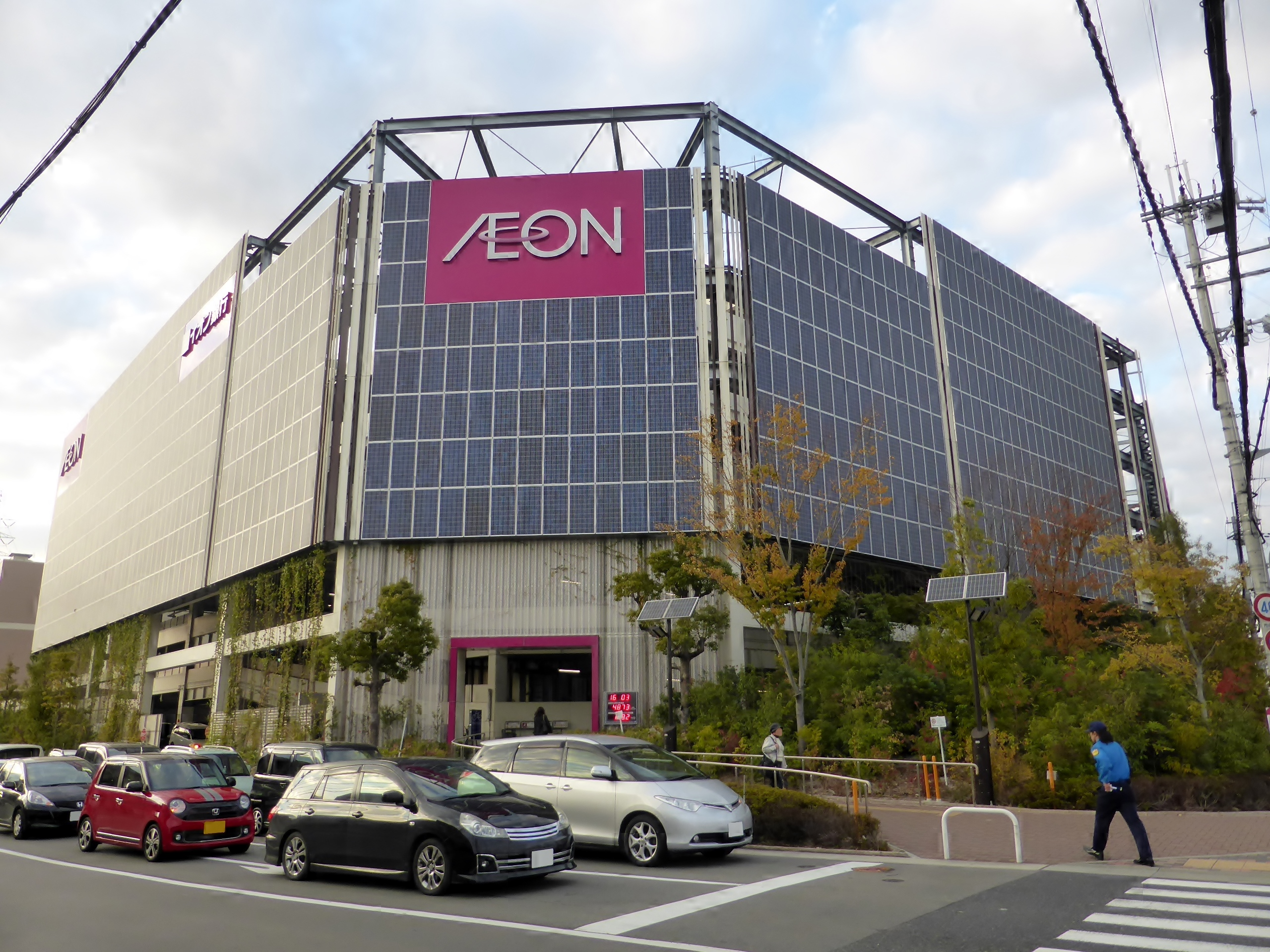 イオンモール伊丹昆陽に配置されているソーラーパネルを撮影